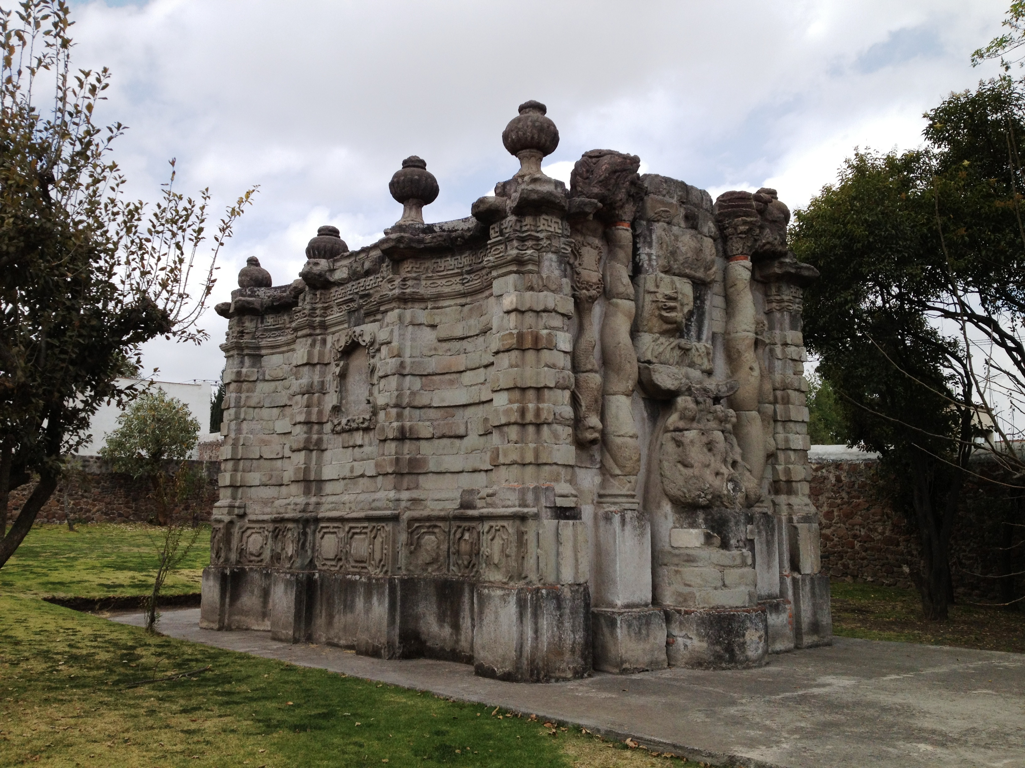 Dentro del Huerto del Ex Convento de San Francisco Javier en Tepotzotlan, Estado de Mexico se encuentra la fuente original de Salto del Agua realizada en 1779.